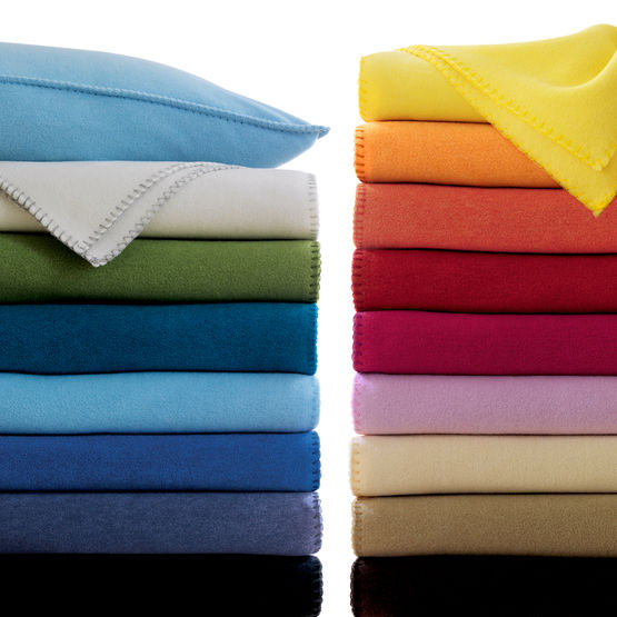 Tessuto Antron Fleece